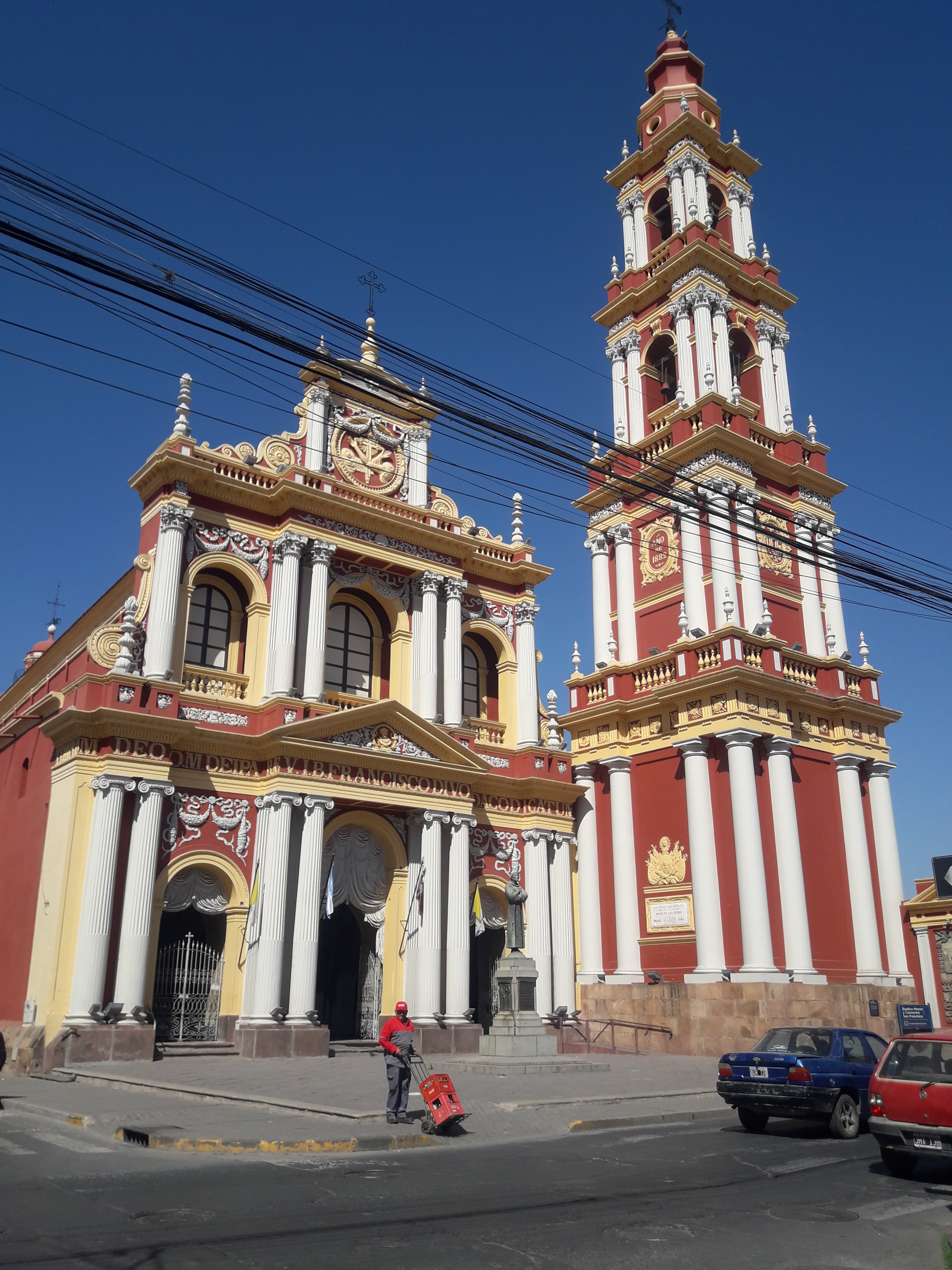 Basilica Menor y Convento de San Francisco de la ciudad de Salta